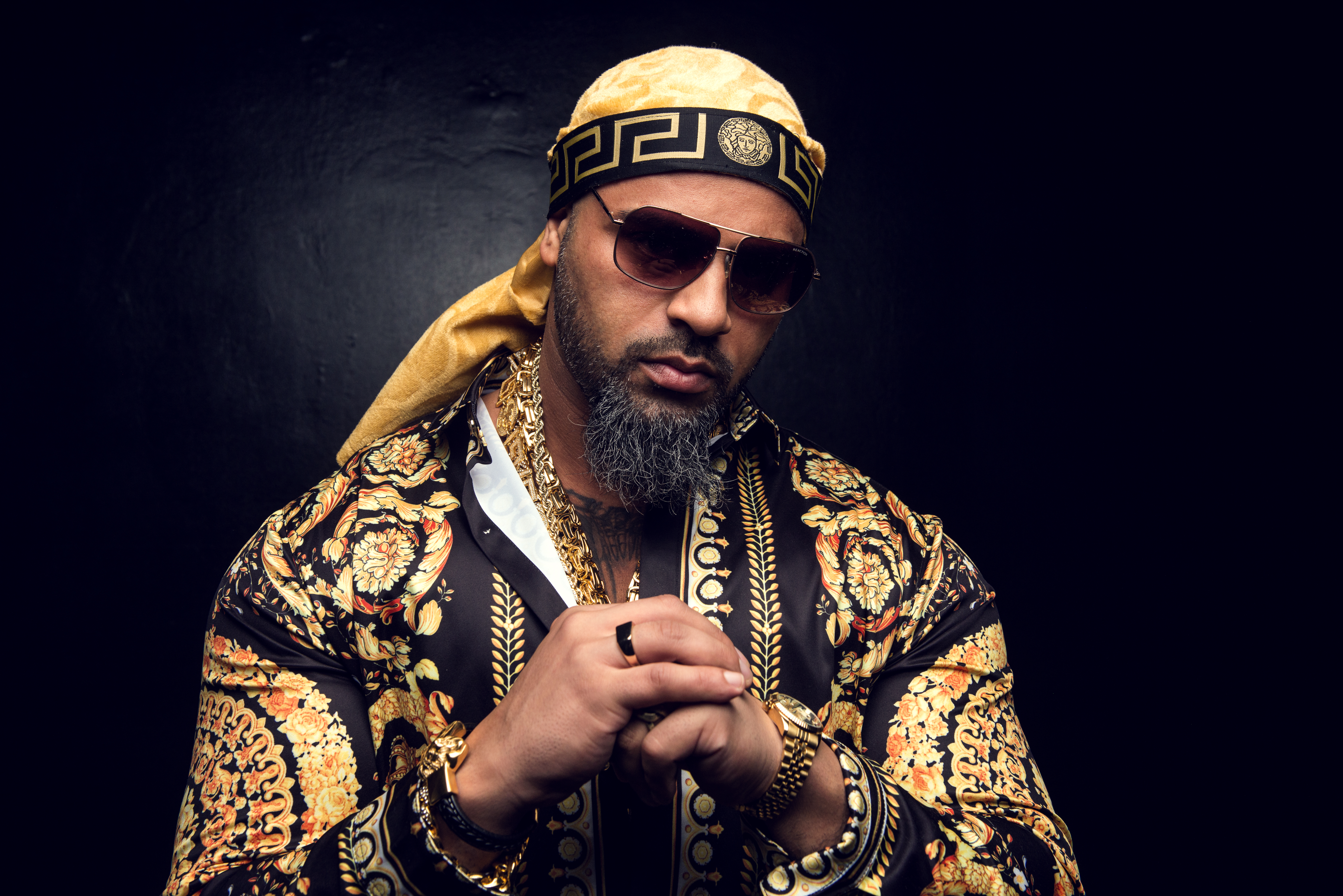 Pressefoto von Massiv